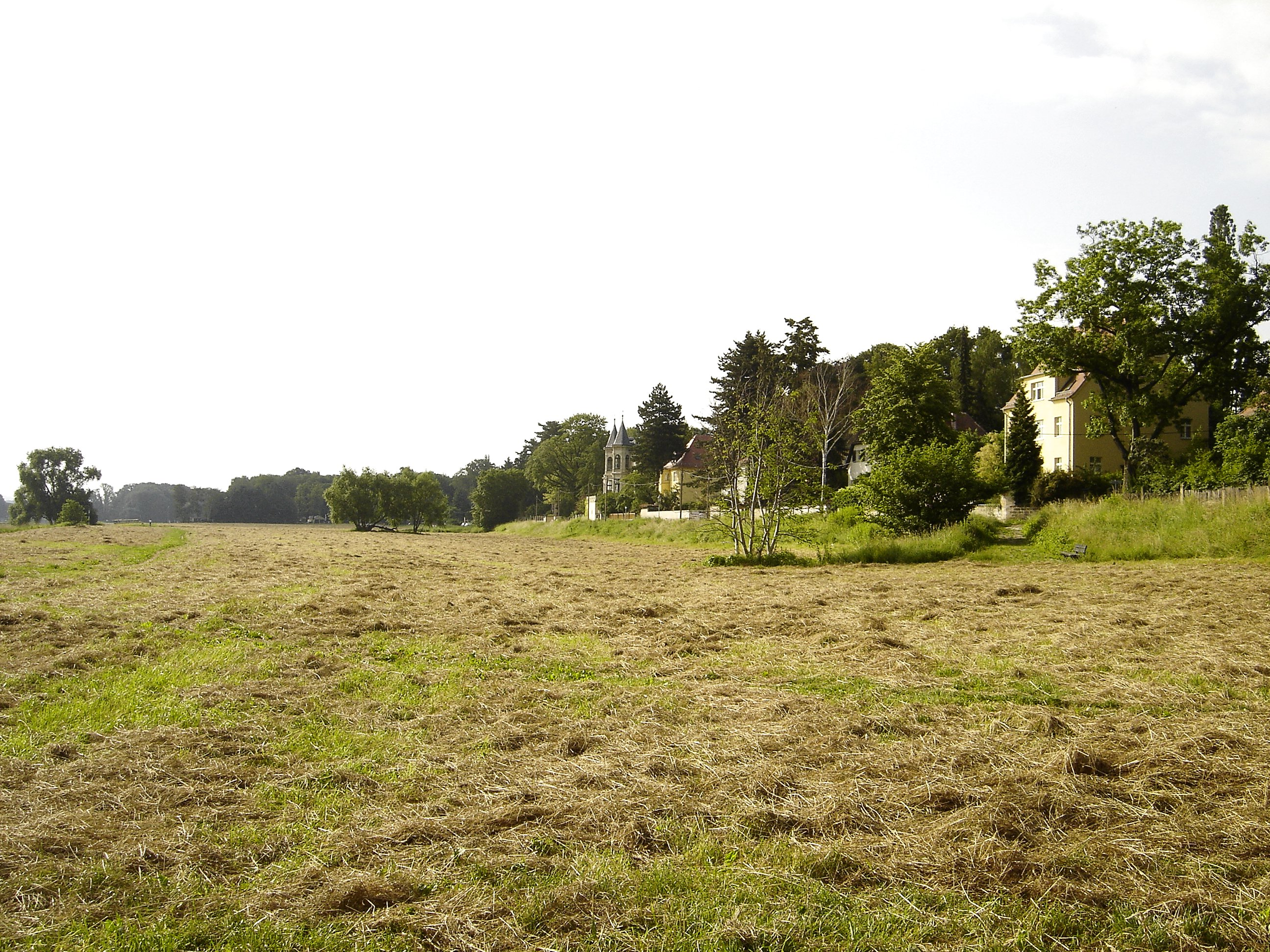 elbe meadows in front of Kleinzschachwitz (Kleinzschachwitzerufer), Dresden